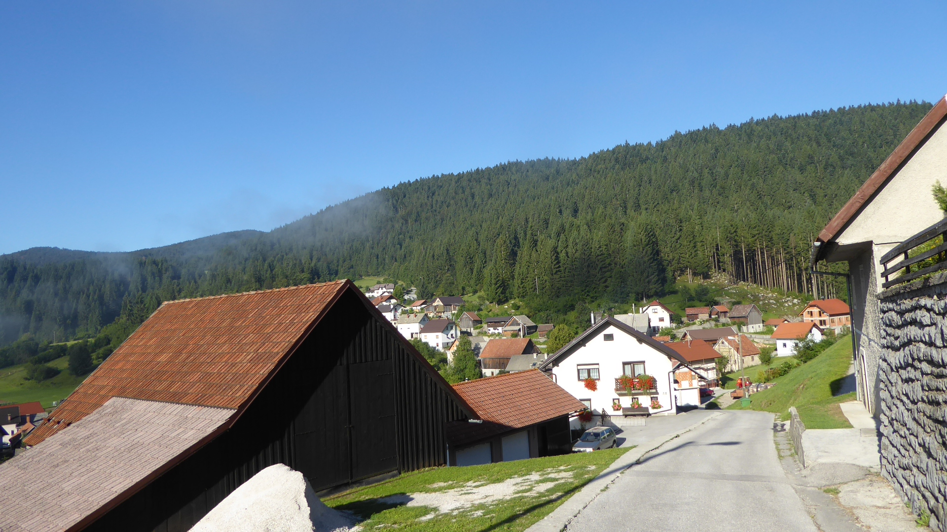 Šegova vas